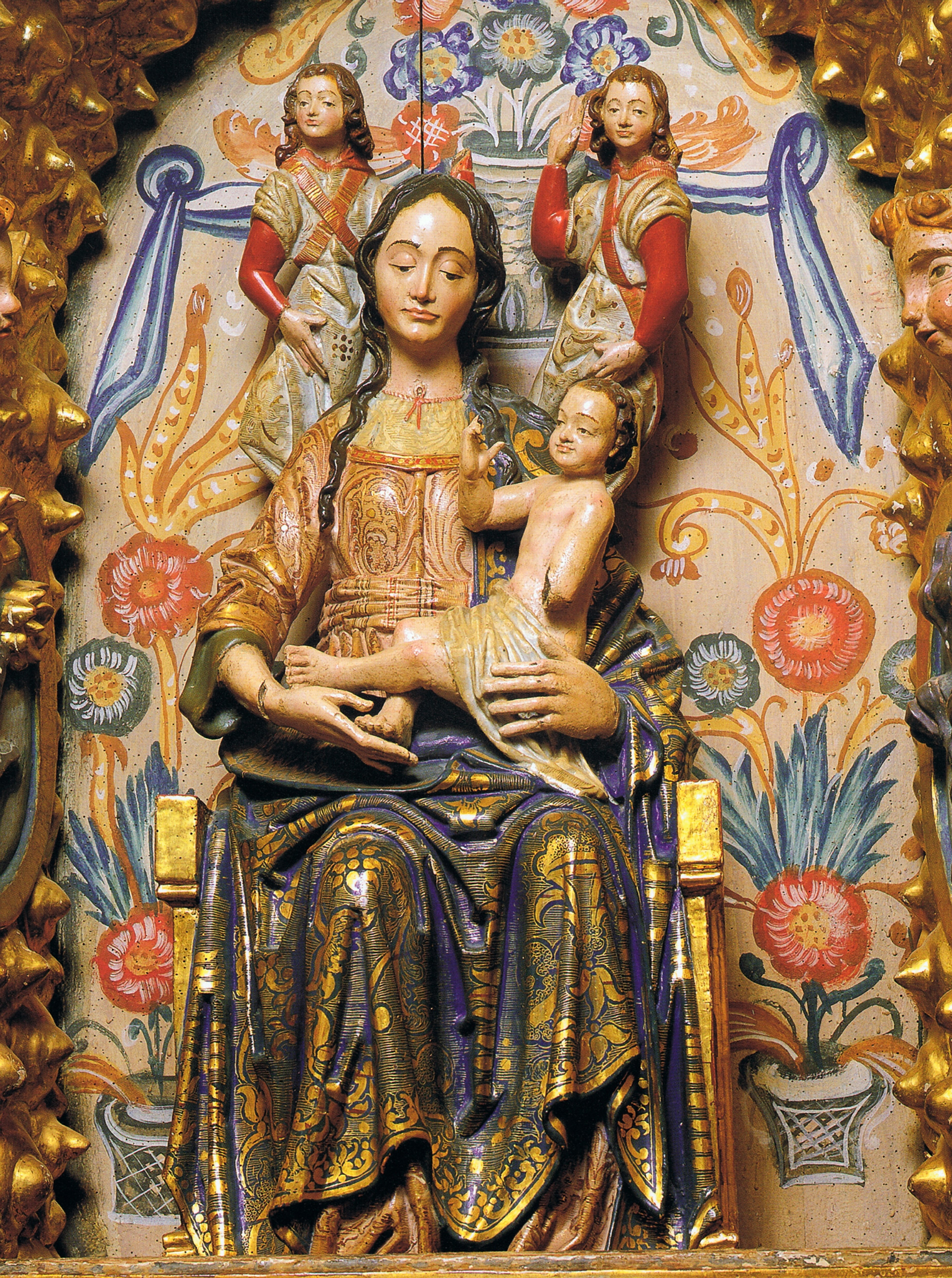 Virgen de los Ángeles de Alejo de Vahía. Hacia 1500. Real Monasterio de Santa Cruz, Villafrechós, (Valladolid).